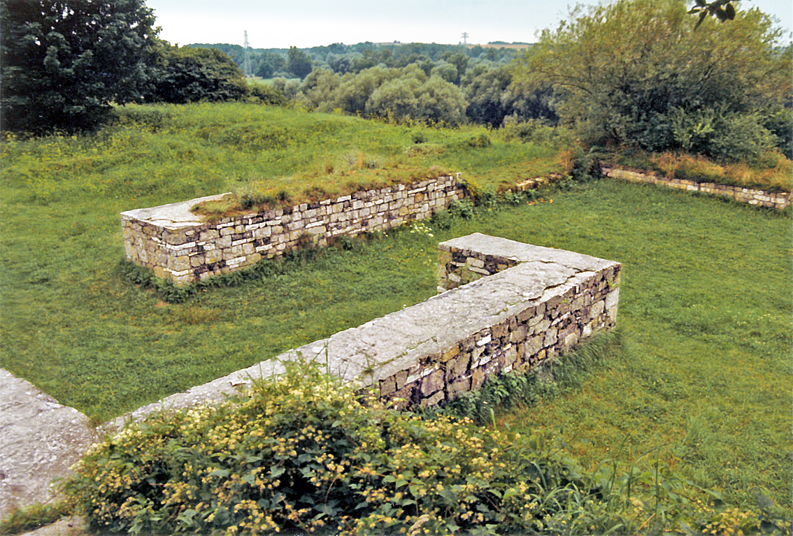 Clavicula-Tor des spätantiken Burgus im Kastellbereich von Abusina. Zustand im August 1991.